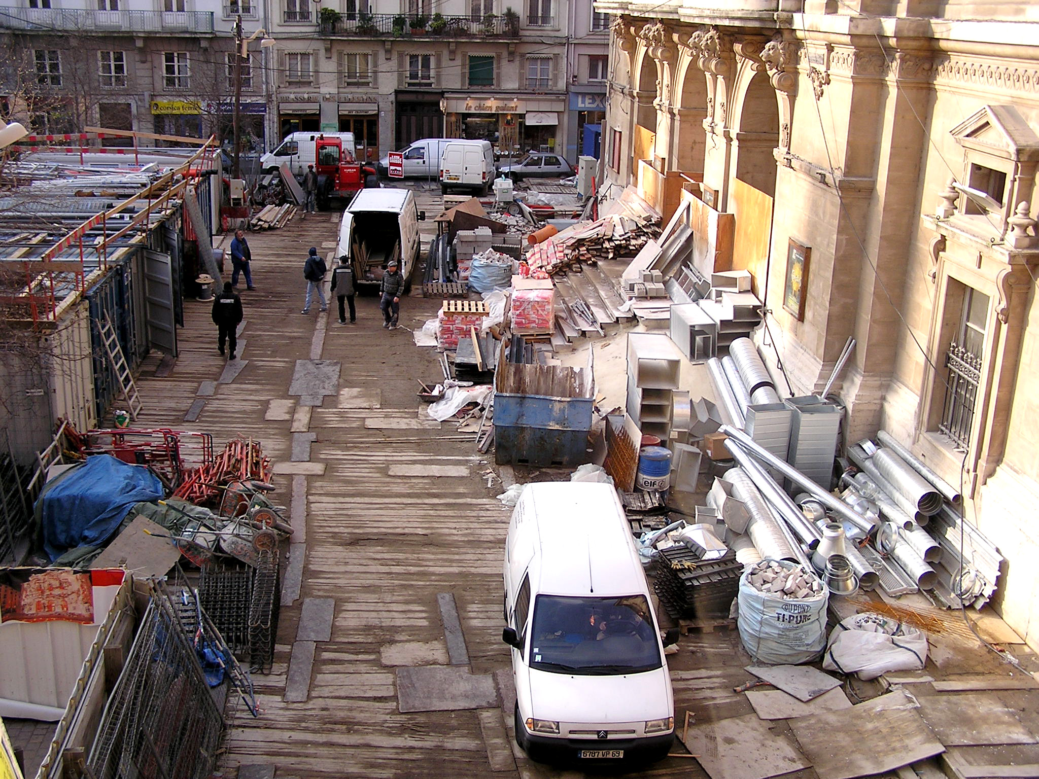 La place des célestins à lyon pendant les travaux du théâtre qui touchent à leur fin, en février 2005